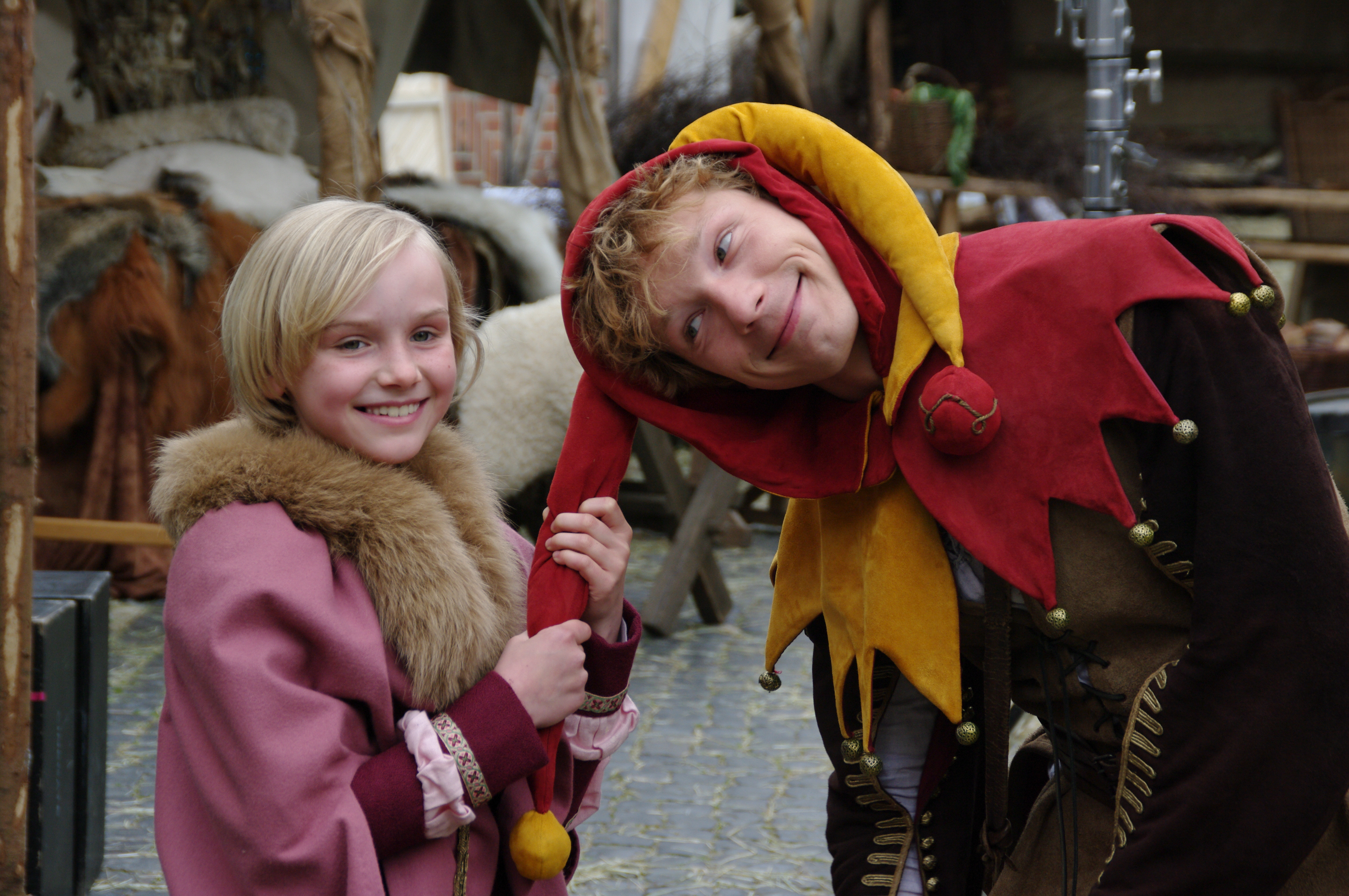 Dreharbeiten zu TILL EULENSPIEGEL 15. Mai 2014 in Quedlinburg